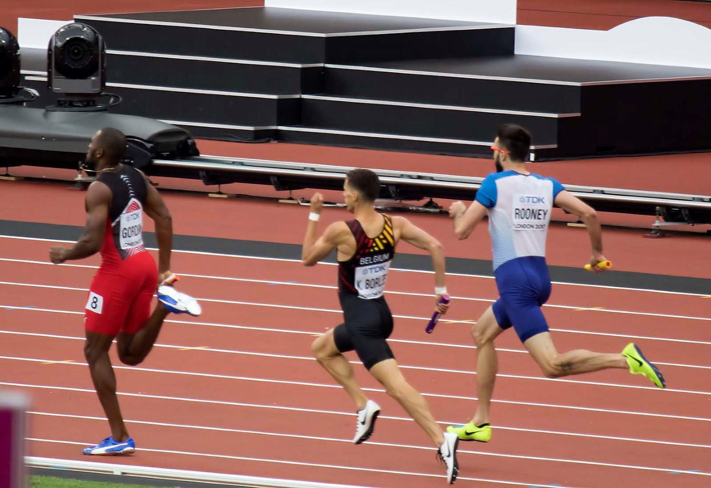 d8_16 4x400m reeksen mannen